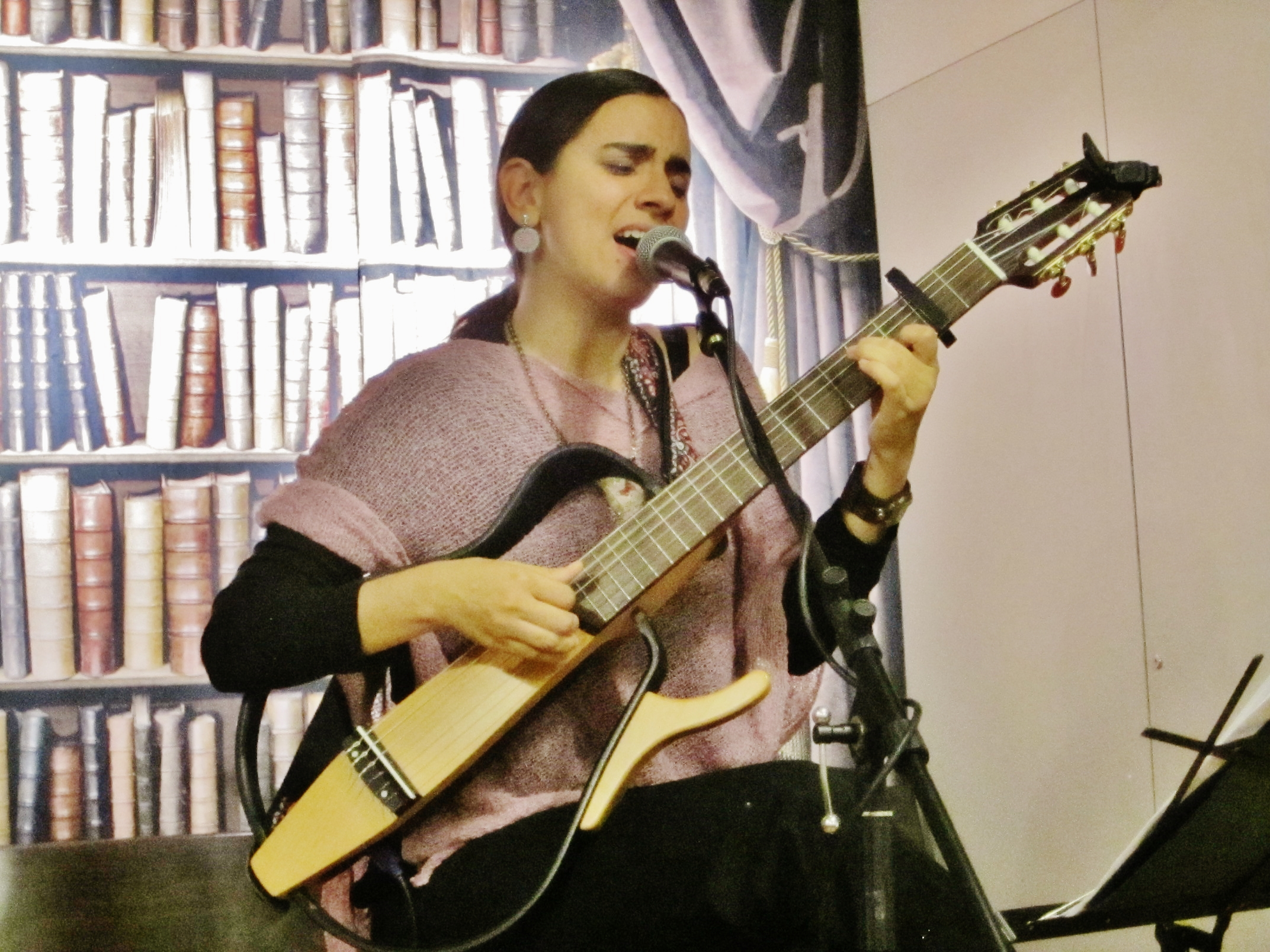 La cantautora colombiana Marta Gómez en escena en Barcelona - 9 de octubre de 2013